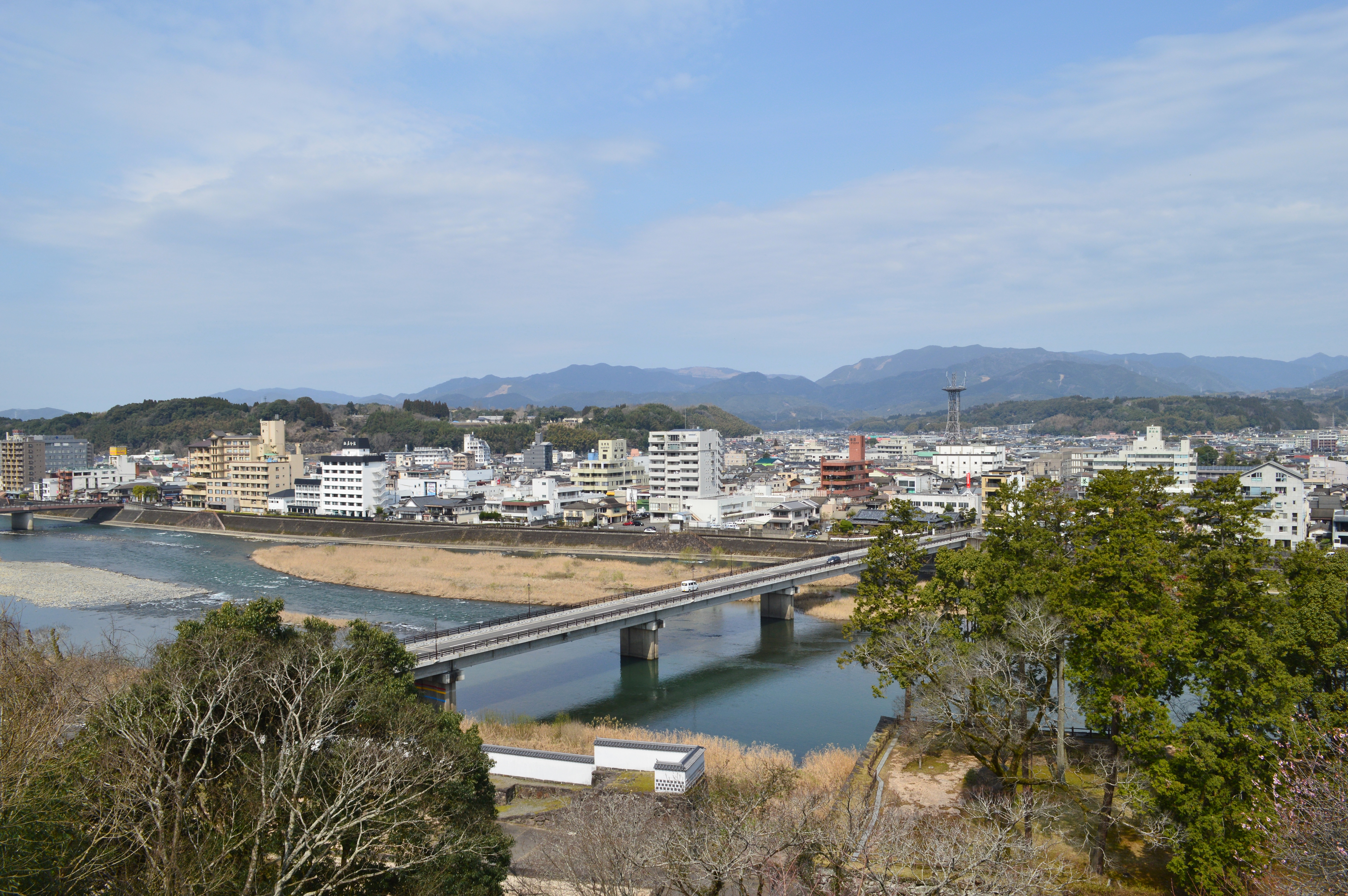 人吉城から望む人吉市街地